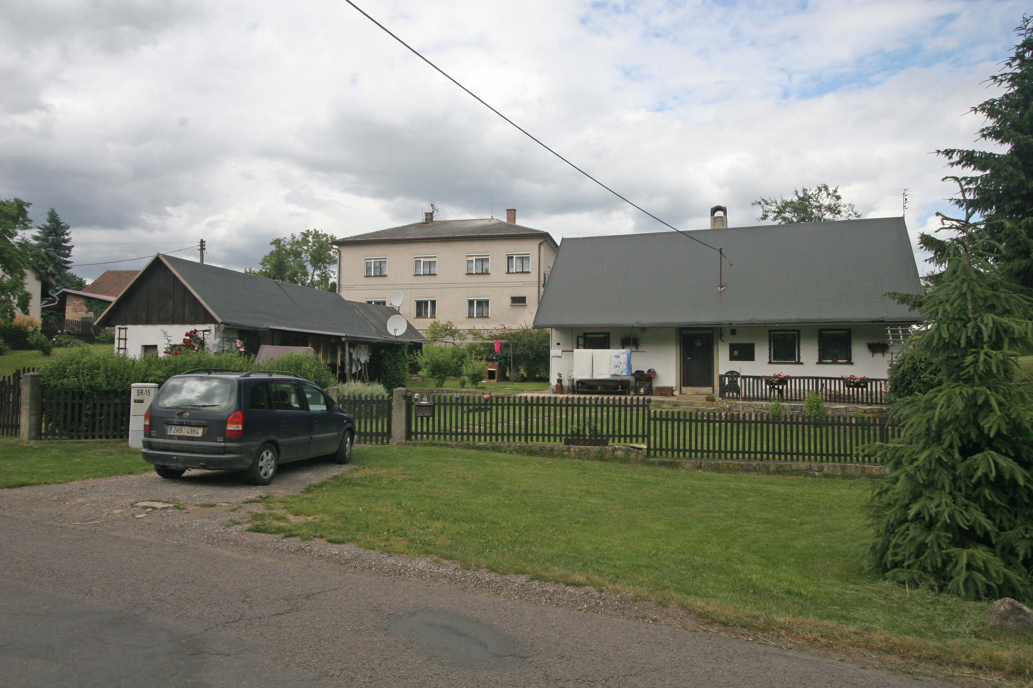 Vilantice čp. 95